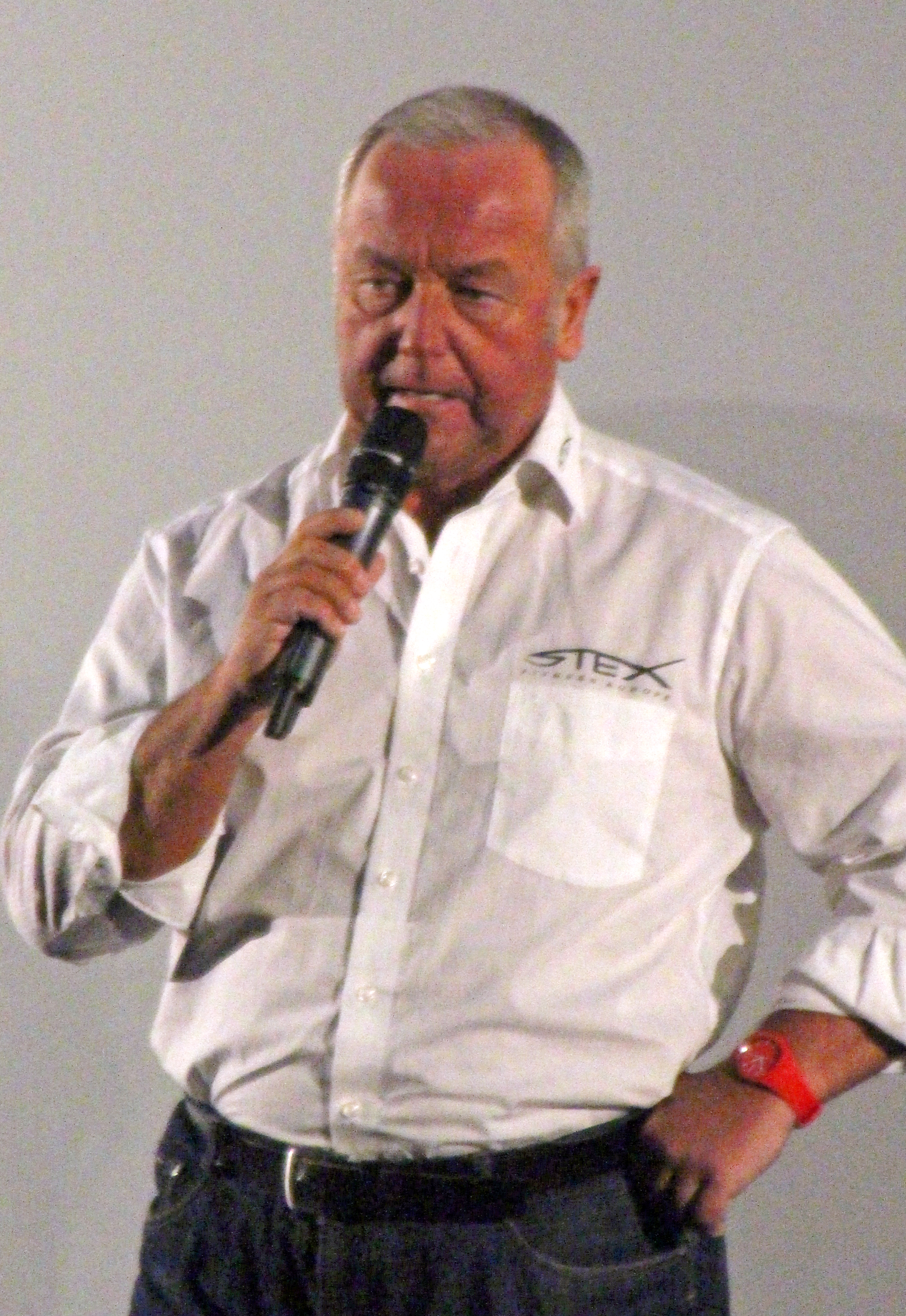 Andreas Marquardt bei der Vorstellung der Verfilmung seiner Autobiografie, Härte, bei der Berlinale 2015 im Cubix am Alexanderplatz